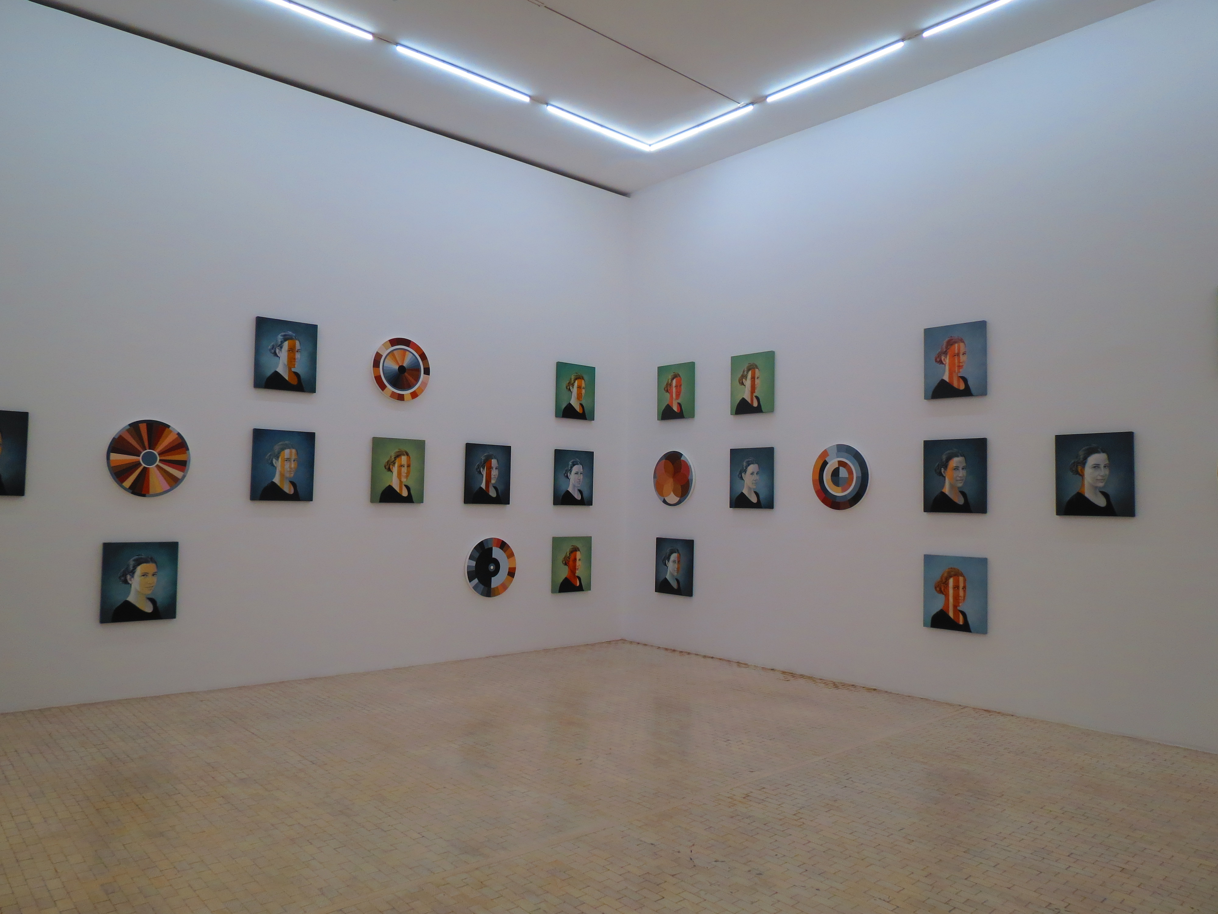 Vista de la exposición de Adriana Varejão, Otros cuerpos detrás en el Museo Rufino Tamayo. La exposición se compone de una retrospectiva de la obra de la artista a partir de dos series: Ruinas de carne seca y Polvo.